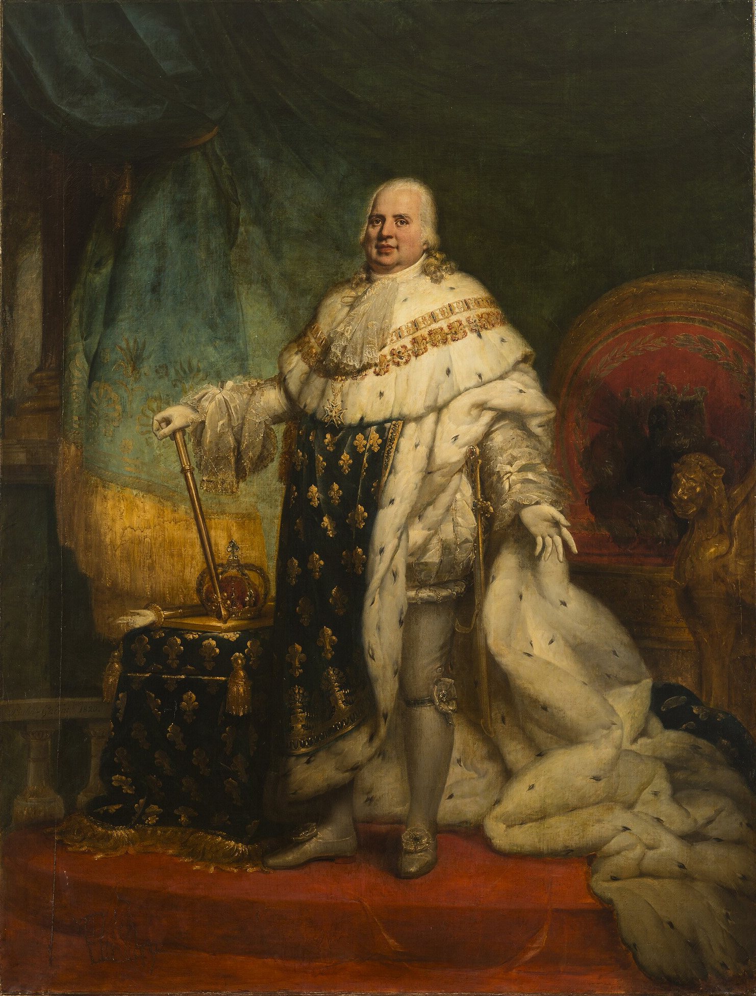 Copie d'après un original destiné au roi d'Angleterre, exposé en 1819